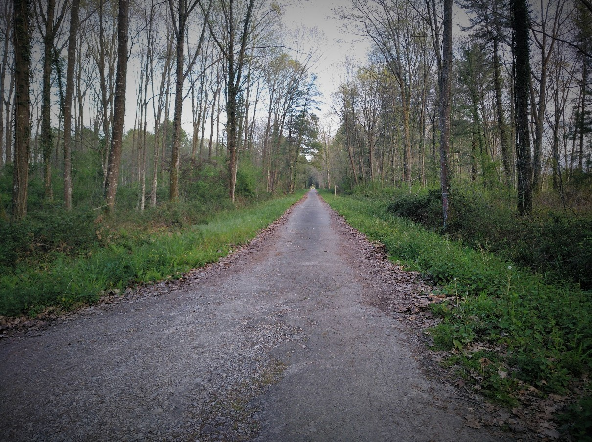 Gurseko esparruko kale nagusiaren aztarna, Bearno